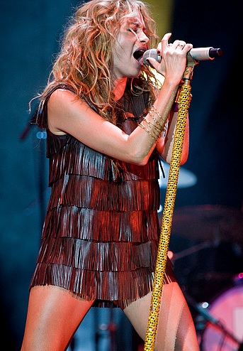 Paulina Rubio. Asics Music Festival, Palau Sant Jordi, Barcelona, 2007